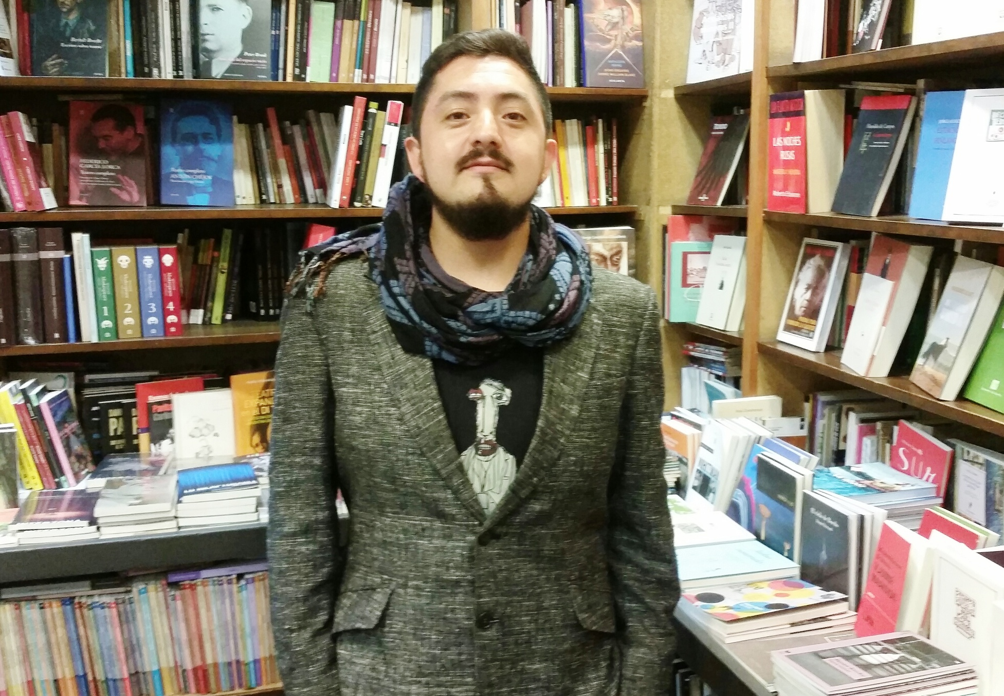 Guido Arroyo en la Librería Norte, de Buenos Aires.